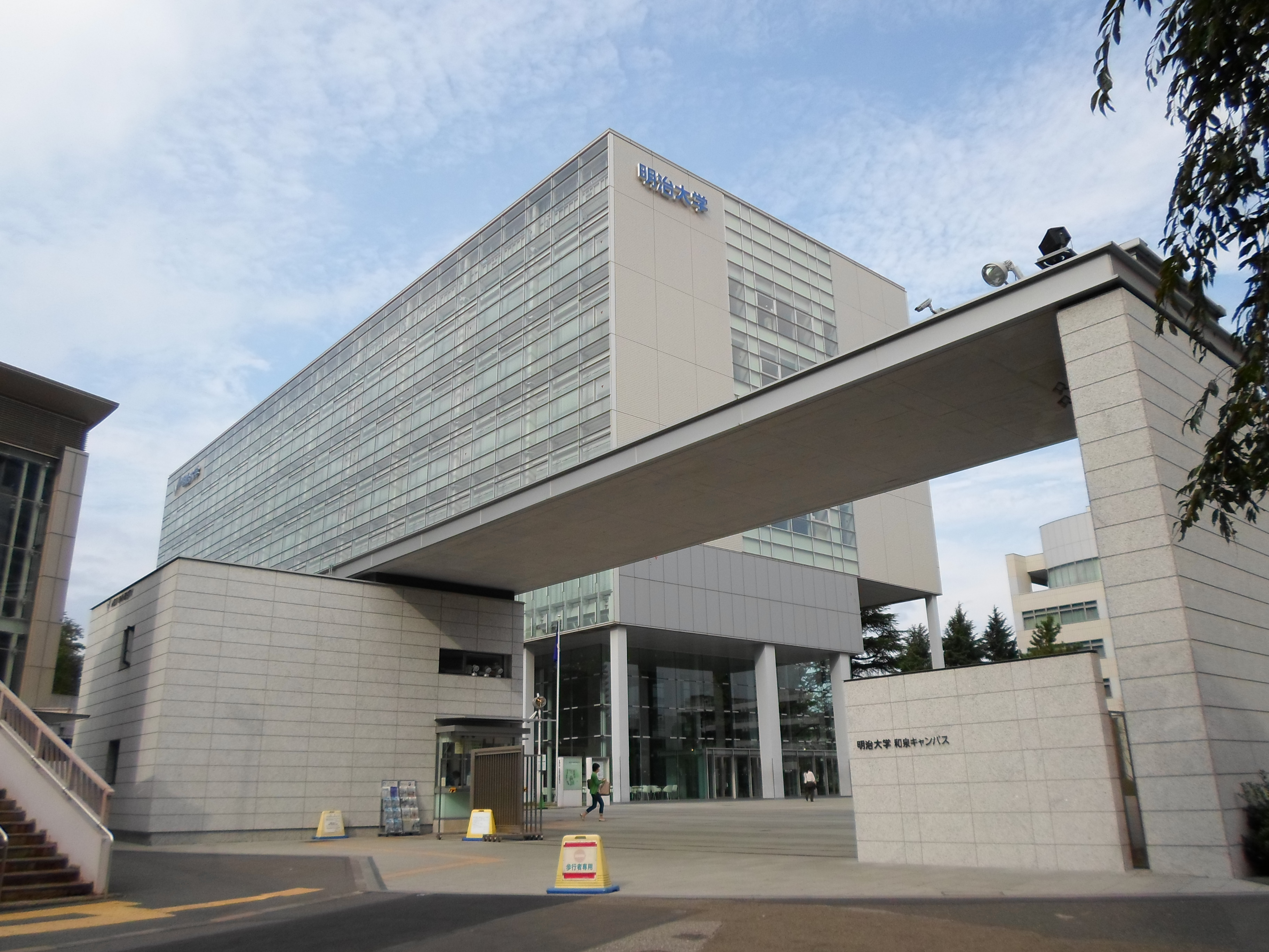 明治大学和泉キャンパス。日本東京都。